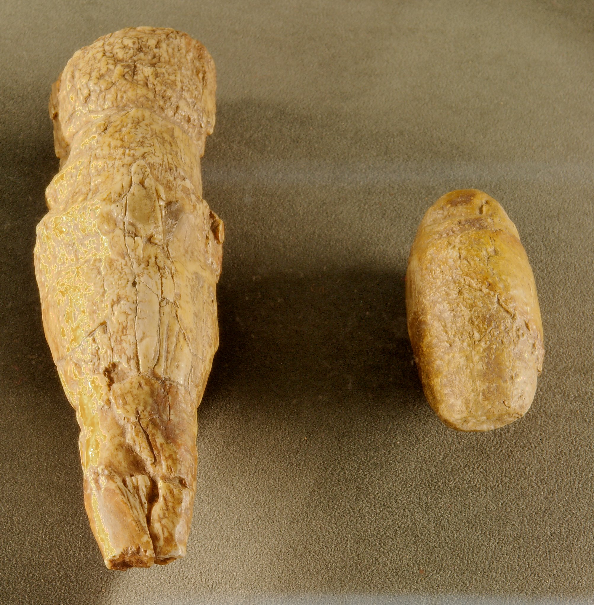 sogenannte Venus II und III von Willendorf.